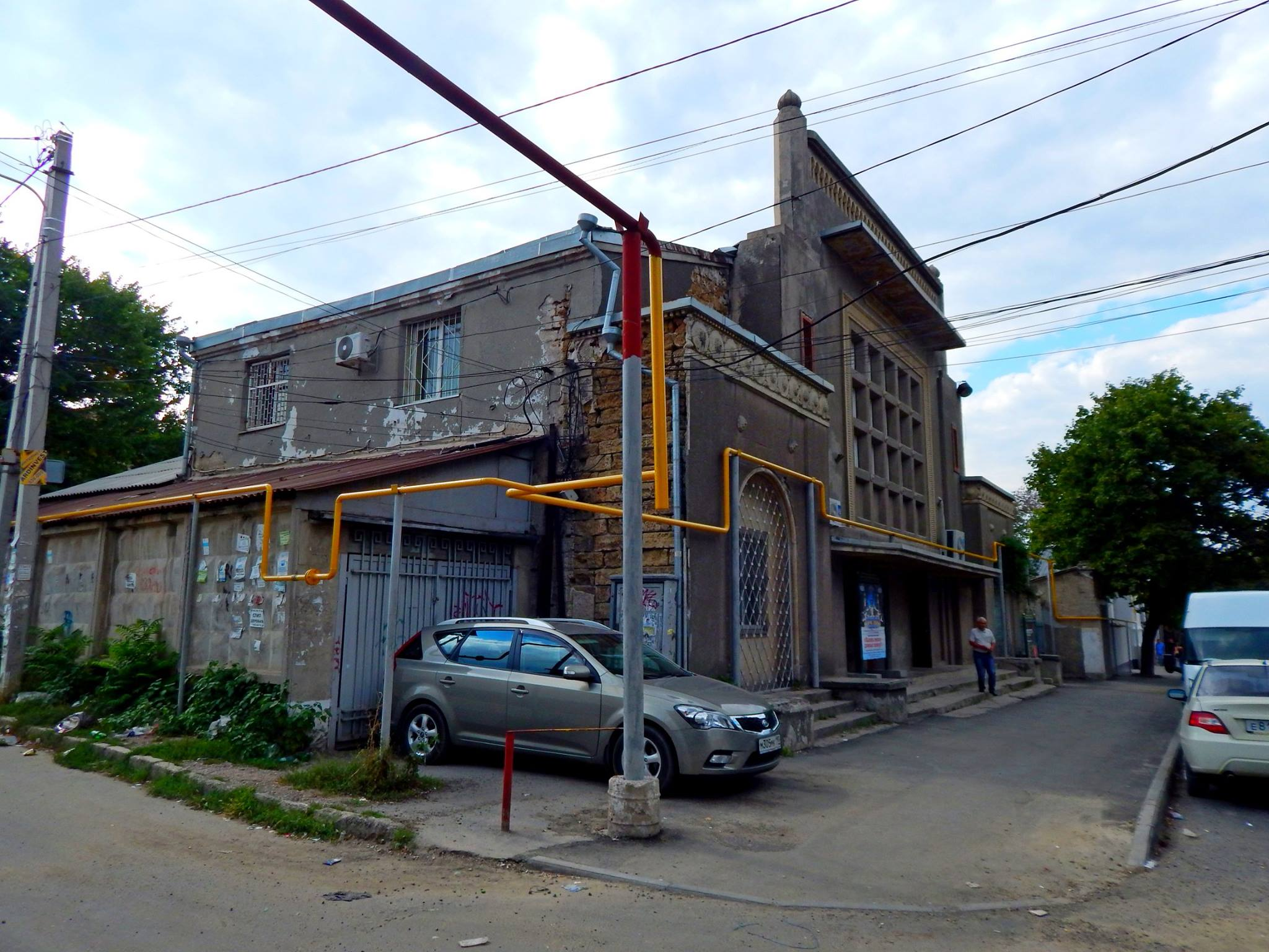 Кинотеатр Родина, Симферополь